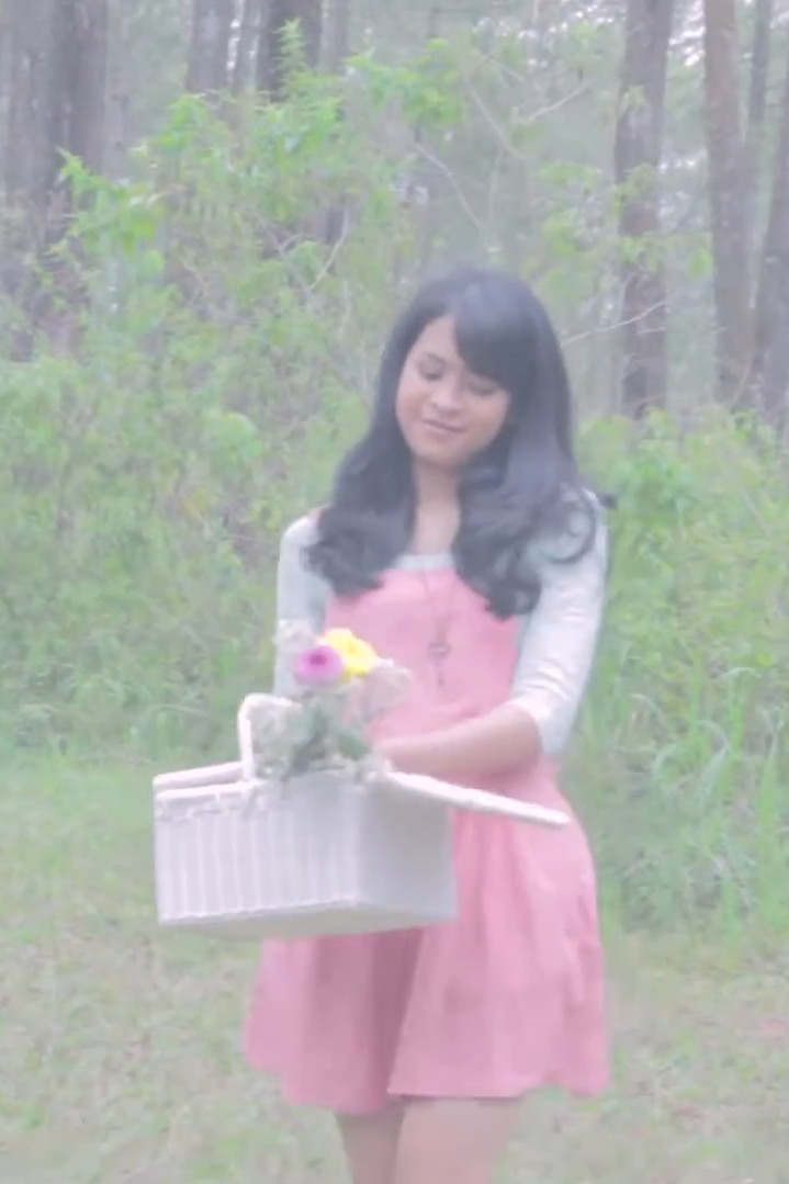 Tahun 2014, Maudy Ayunda merilis lagu berjudul Lovable. Photo adalah hasil tangkapan layar dari musik video Lovable versi Director's Cut yang diunggah oleh "Ryoichi Adityo Hutomo" (sutradara musik video) dengan judul "MAUDY AYUNDA - LOVABLE (Director's Cut)" yang dilisensikan Lisensi Atribusi Creative Commons (boleh digunakan kembali).